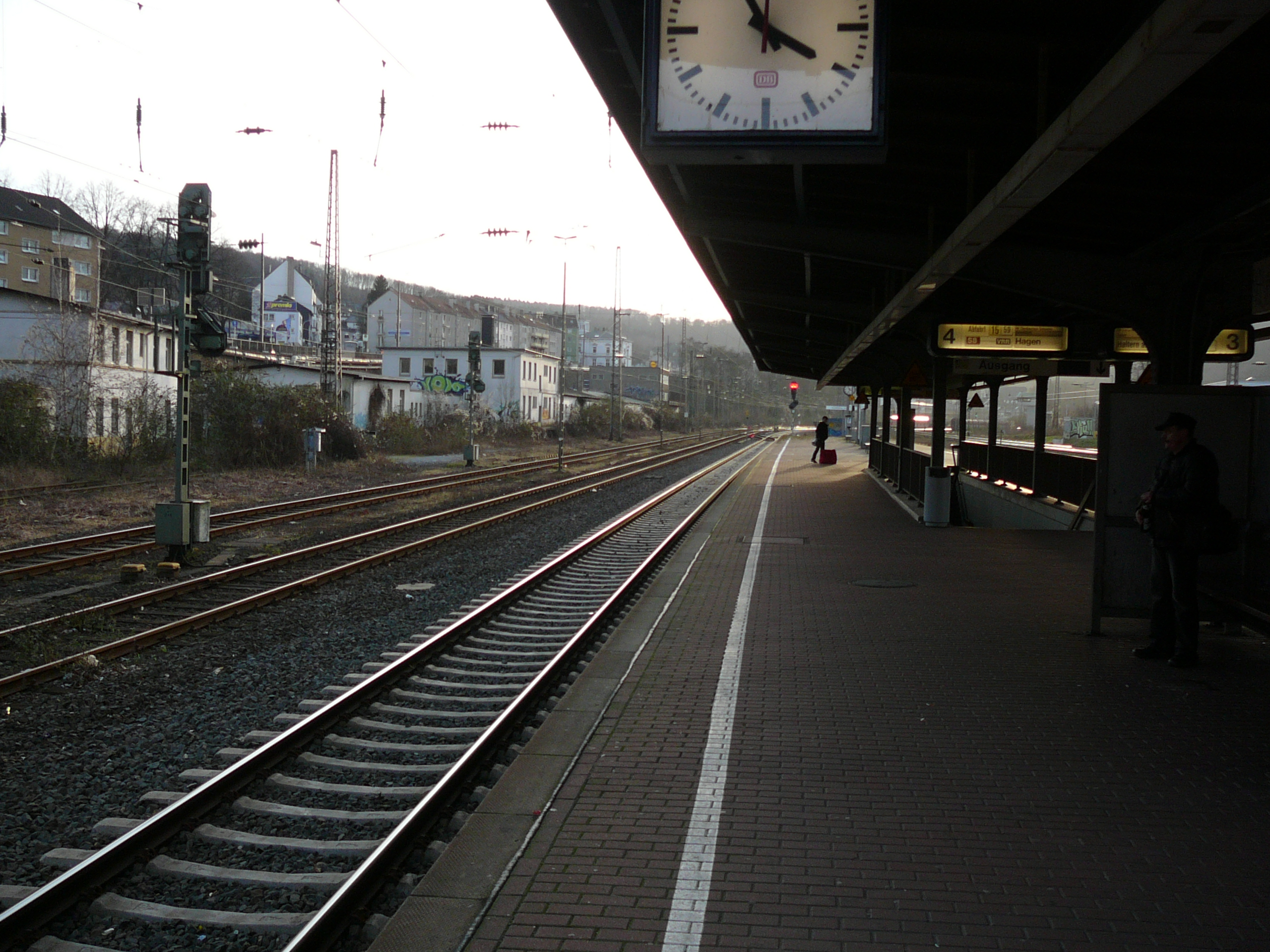 Arrenberg, Wuppertal